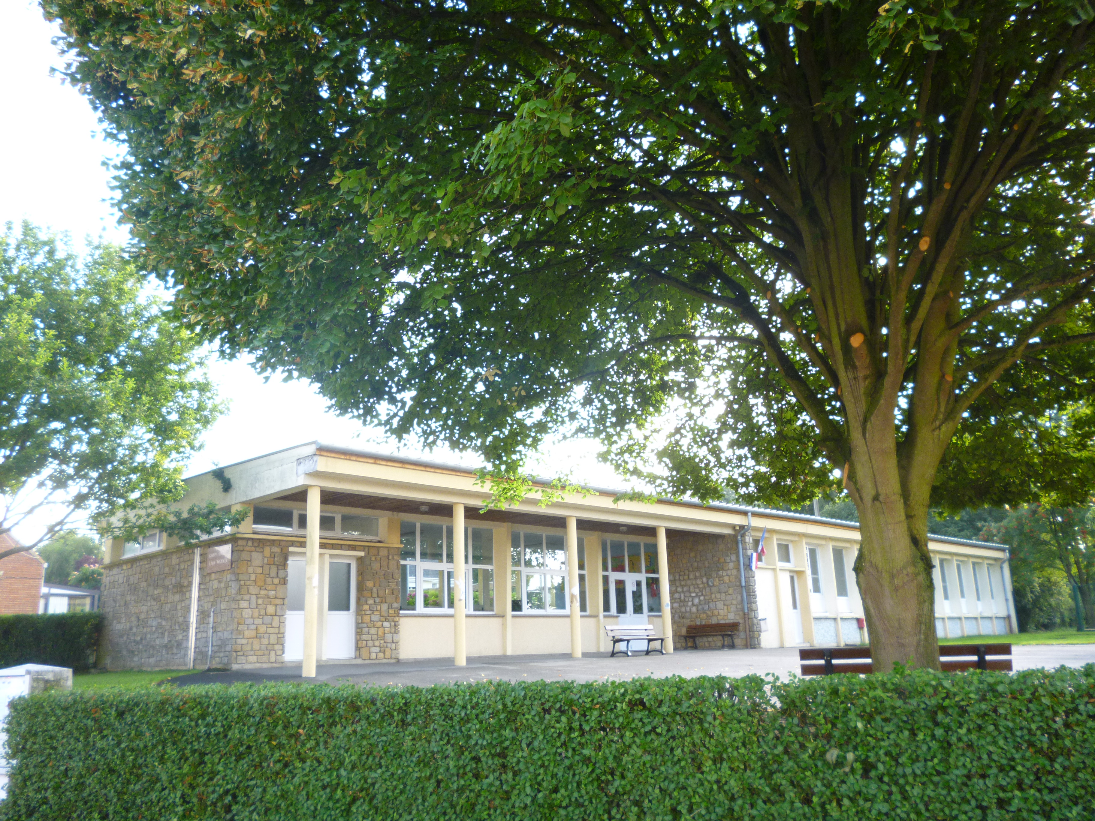 Ecole Léon Waymel vue de la rue de Bellonne